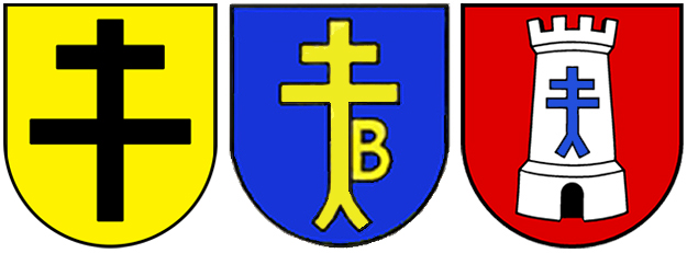 Gemeindewappen von Hochdorf an der Enz, Bissingen an der Enz und Bietigheim-Bissingen – abgeleitet vom "Patriarchenkreuz" des Heilig-Geist-Spitals in Markgröningen